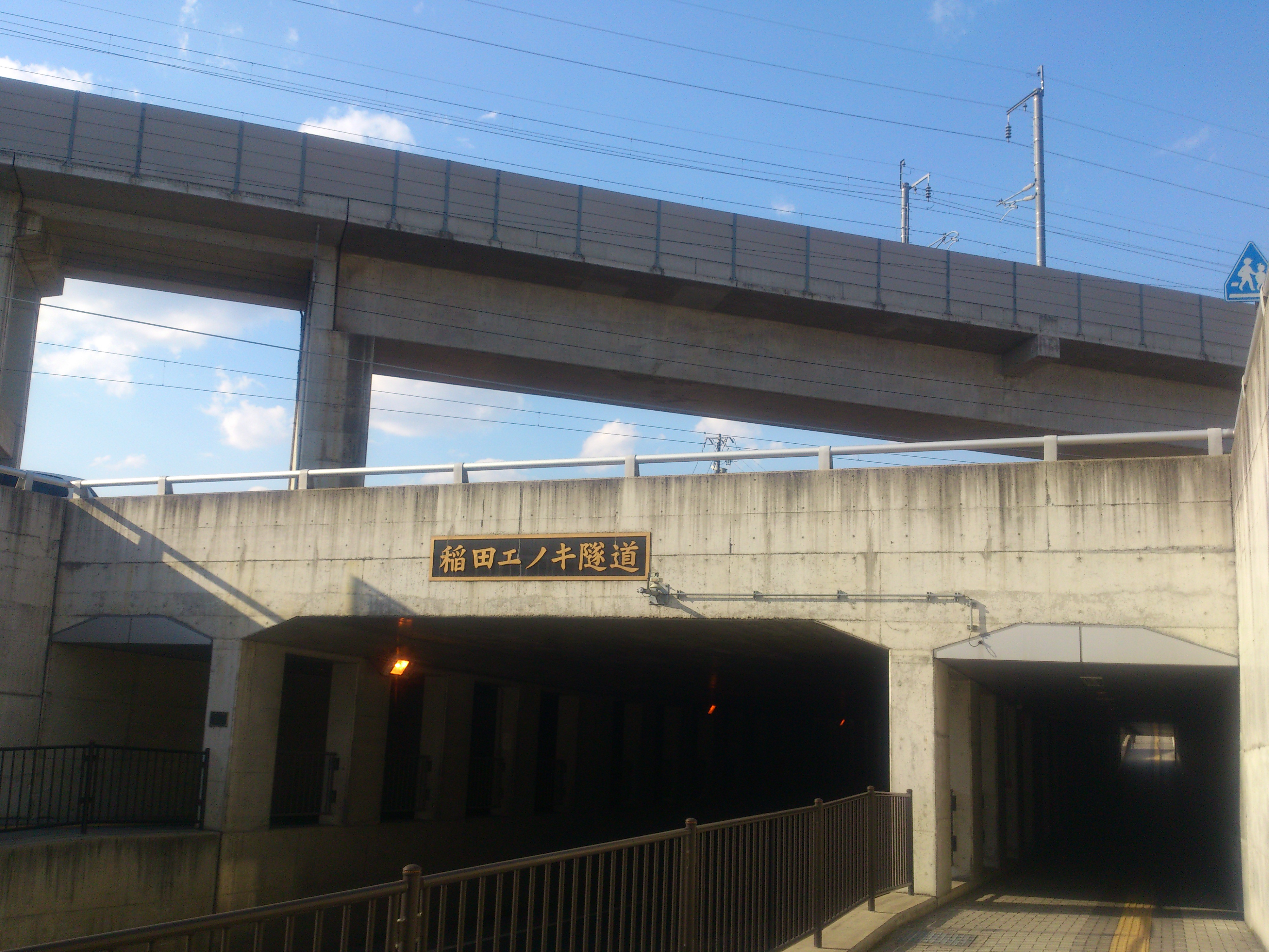 東豊線稲田エノキ隧道（長野市稲田四丁目）